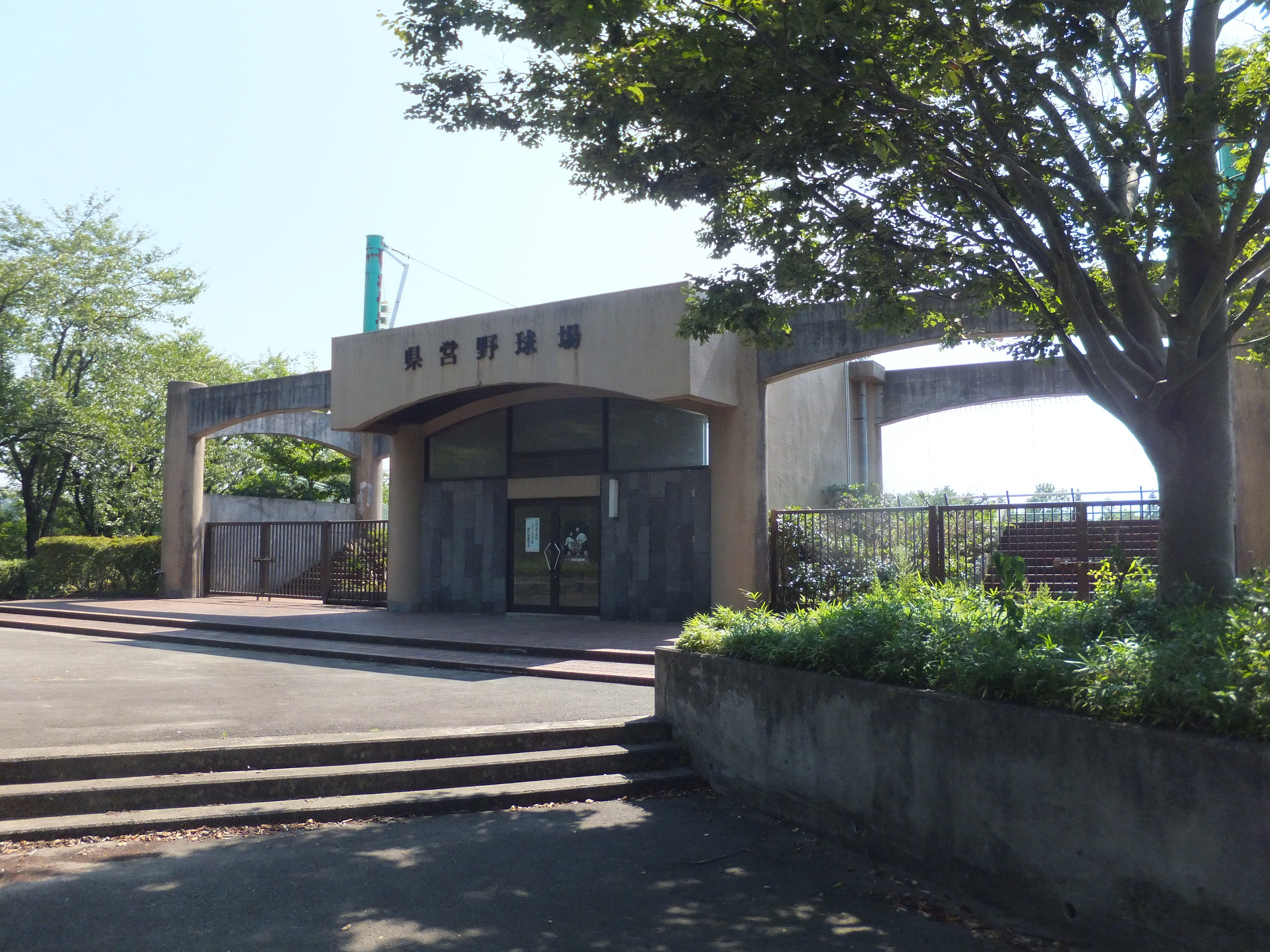 秋田県立中央公園野球場（秋田市雄和）